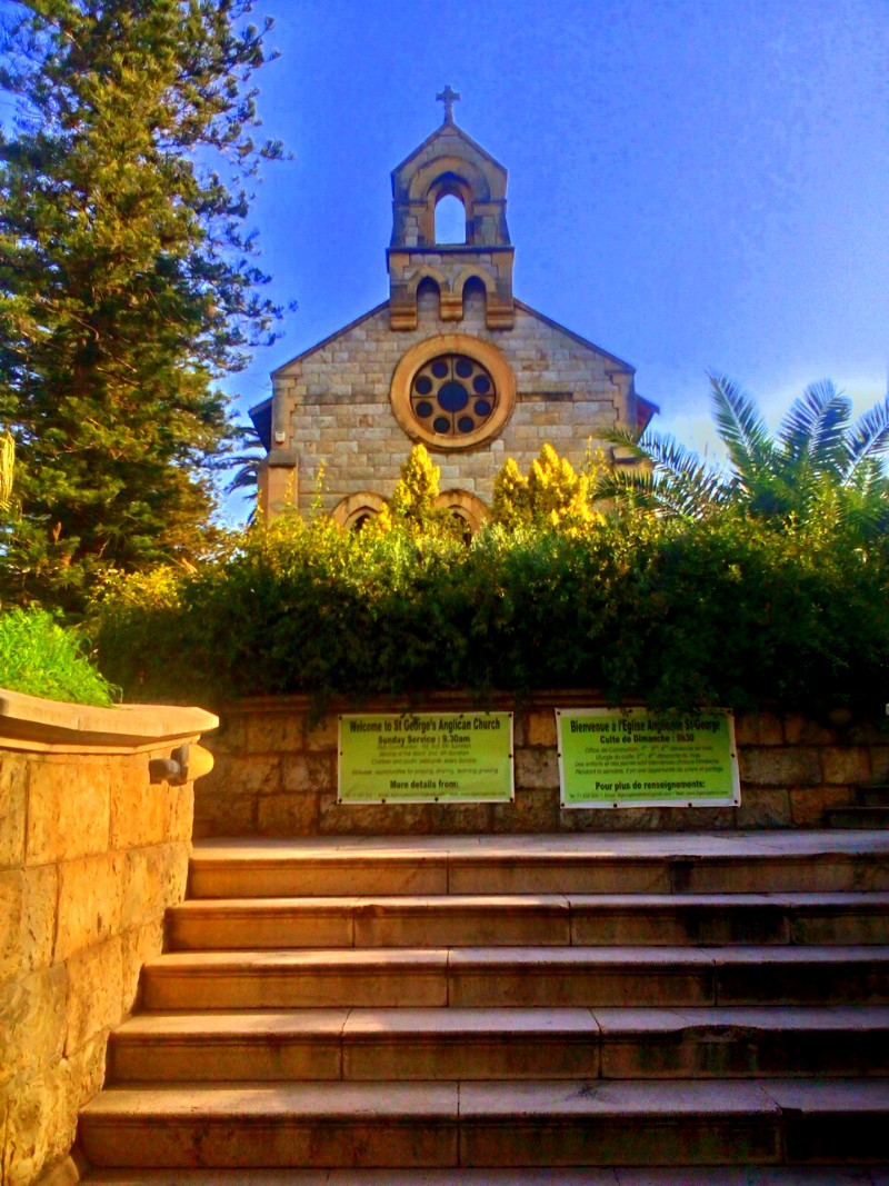 Tunis, Tunisie تونس العاصمة ، تونس